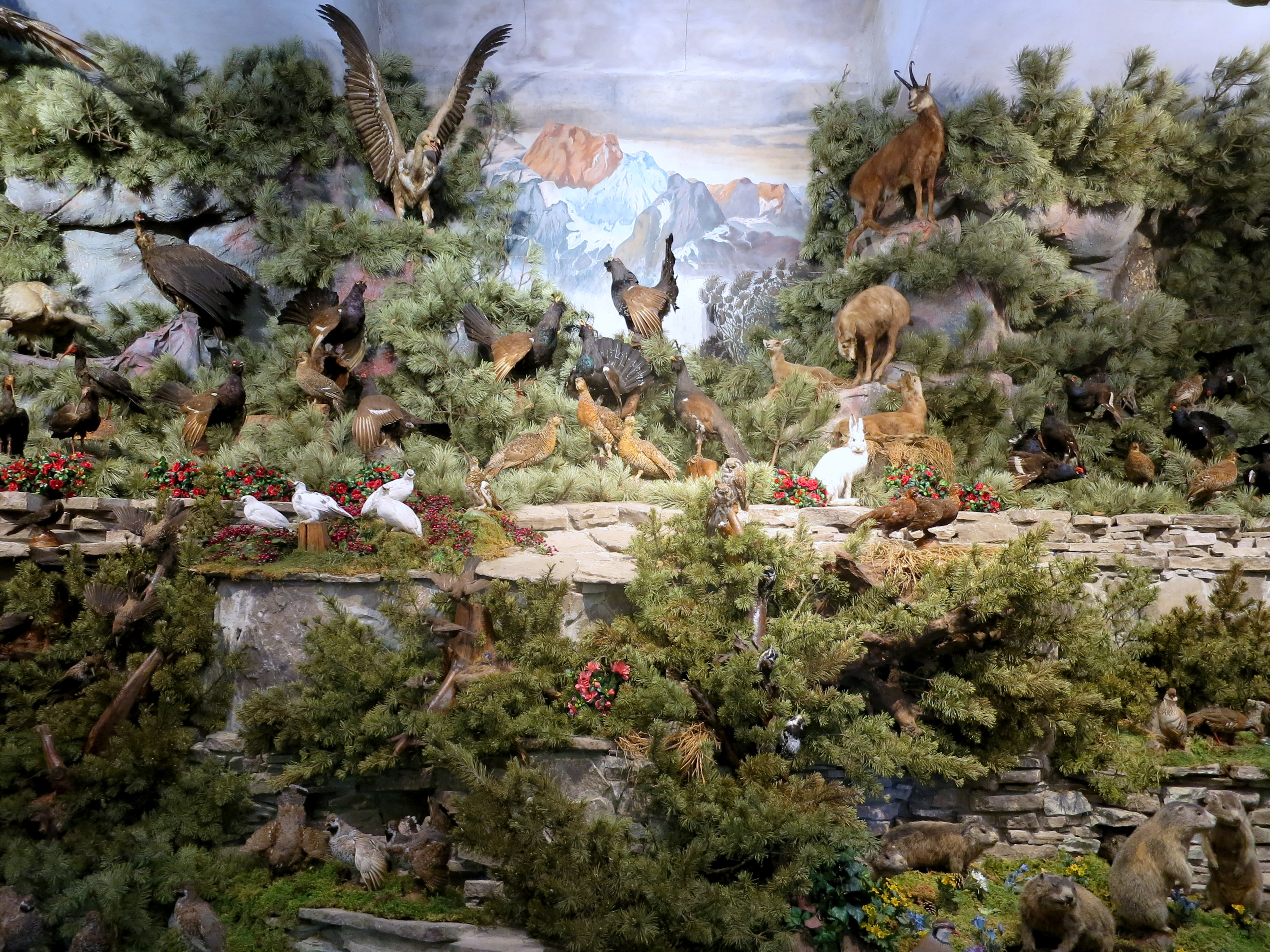 Ein Detail der Tierdioramen